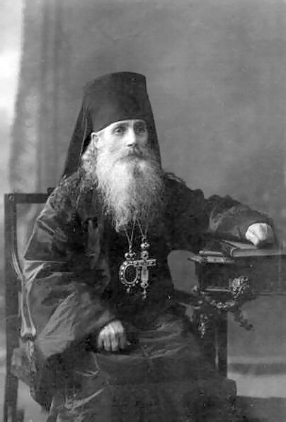 Епископ Воткинский Амвросий (Казанский) Фото 1927 года. Прислано в Воткинск по почте из другого города. На обратной стороне дарственная надпись Евдокии Ивановне Запрудиной и собственноручная подпись « б.еп.Воткинский Амвросий 22 ХII 1927 г.»